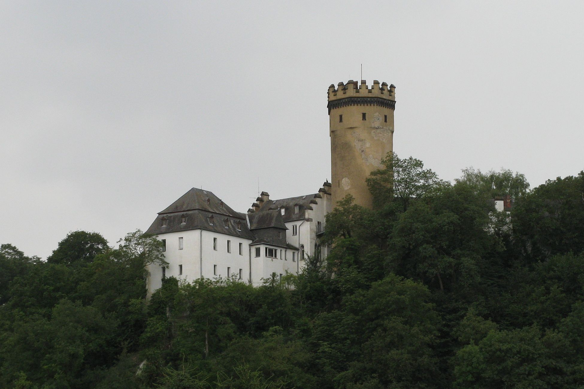 Burg Dehrn (bei Stadt Runkel), im 16. Jahrhundert Schlossartig ausgebaut